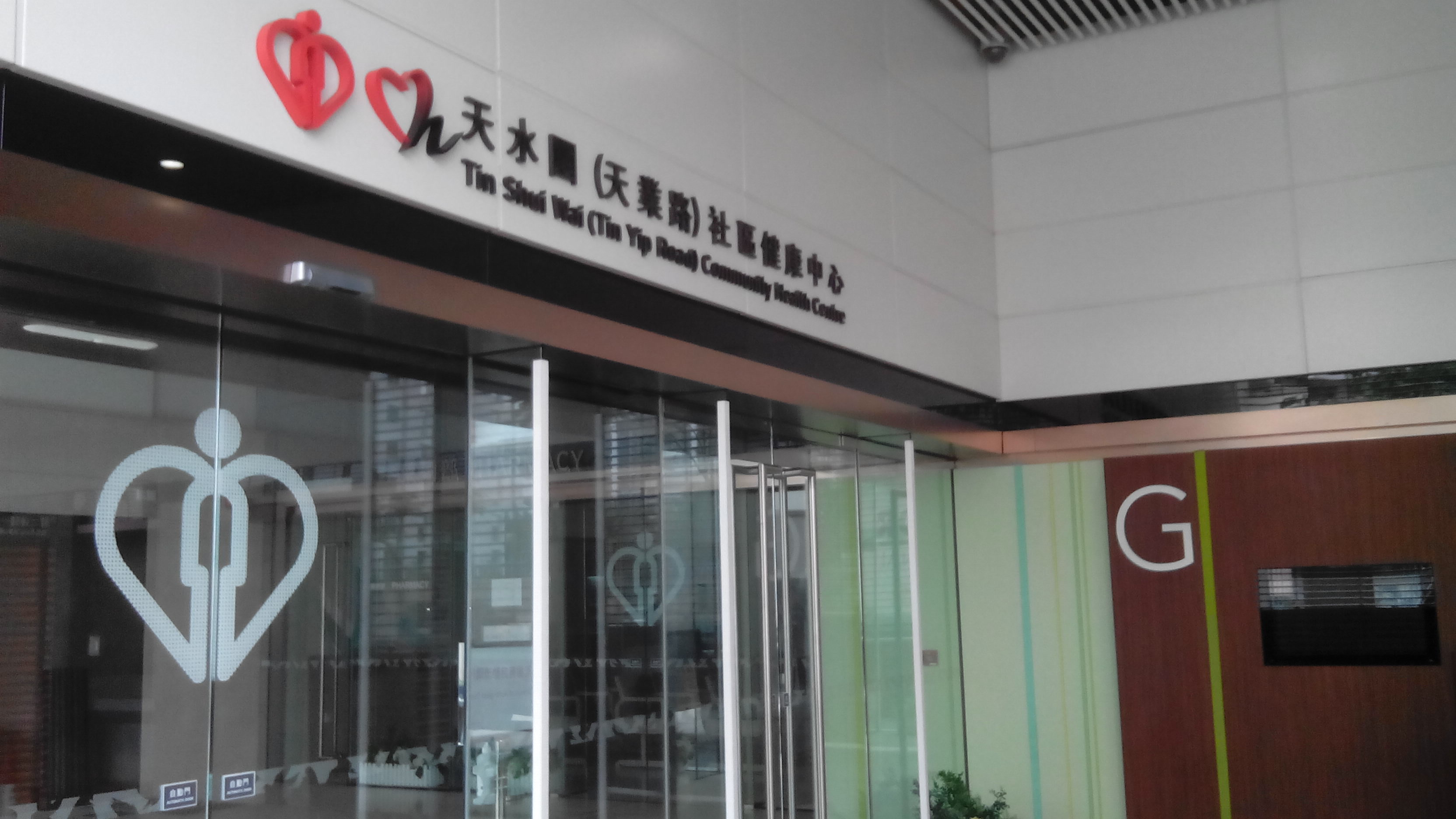 健康中心中心入口